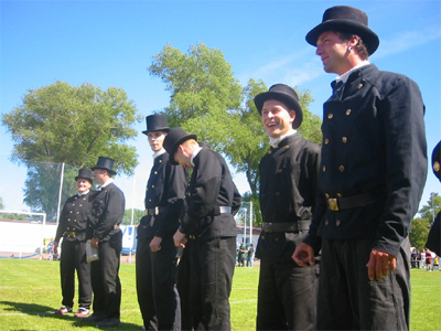 Die Schornsteinfeger um langjährigen Kapitän Wilfried Linka (30) begrüßen ihre Kontrahenten vor dem Anstoß traditionell mit schwarzem Ruß. Schornsteinfeger Linka lief in diesem Jahr zum neunten Mal zum Traditionsspiel in Warnemünde auf, s. SV Warnemünde Fußball